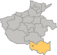 Xin Yang map